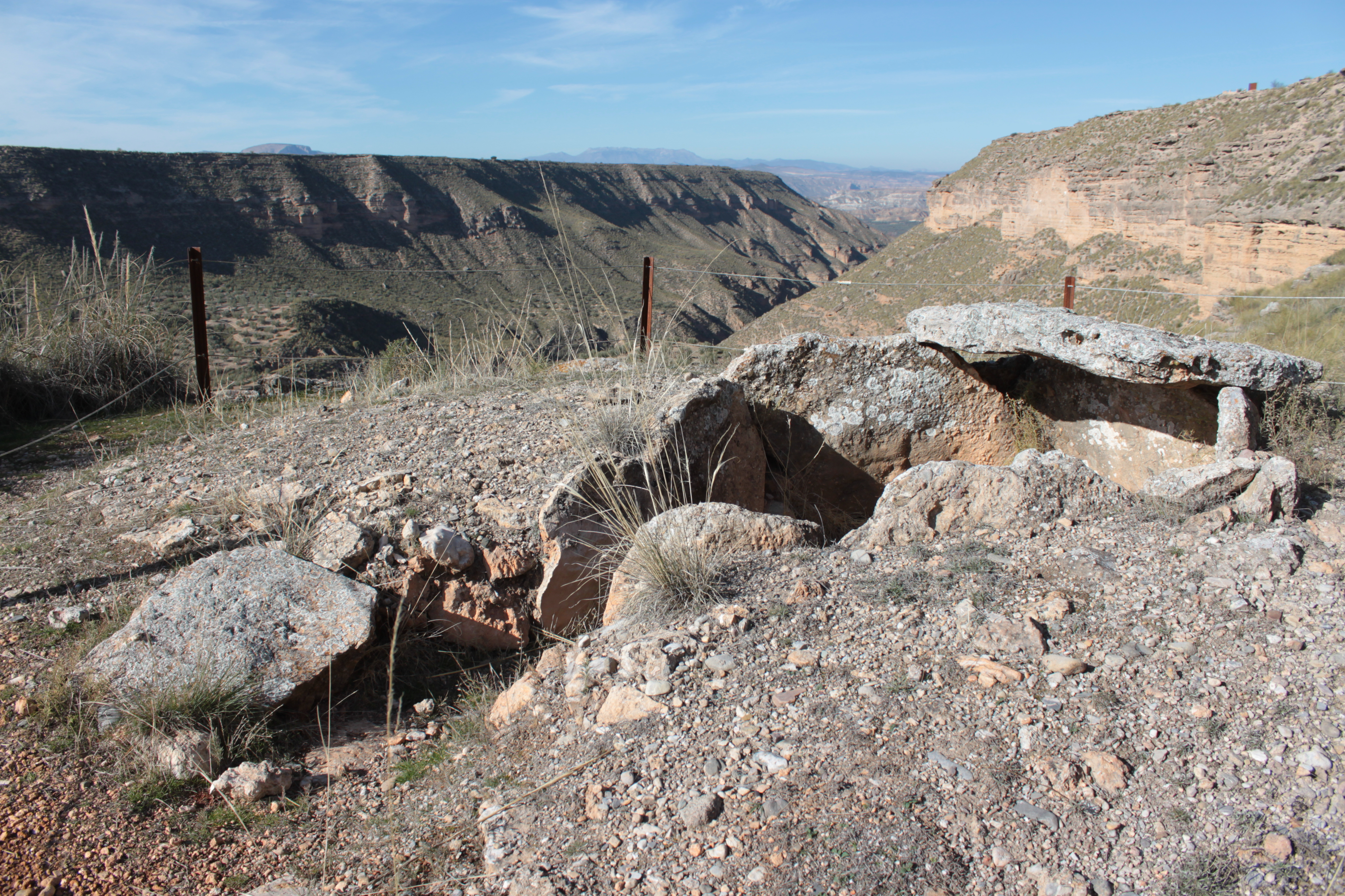 Dolmen 133 del Parque Megalítico de Gorafe situado en la Hoya del Conquil. Gorafe, provincia de Granada, Andalucía, España.